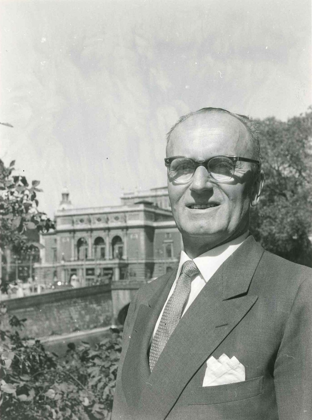 Set Svanholm